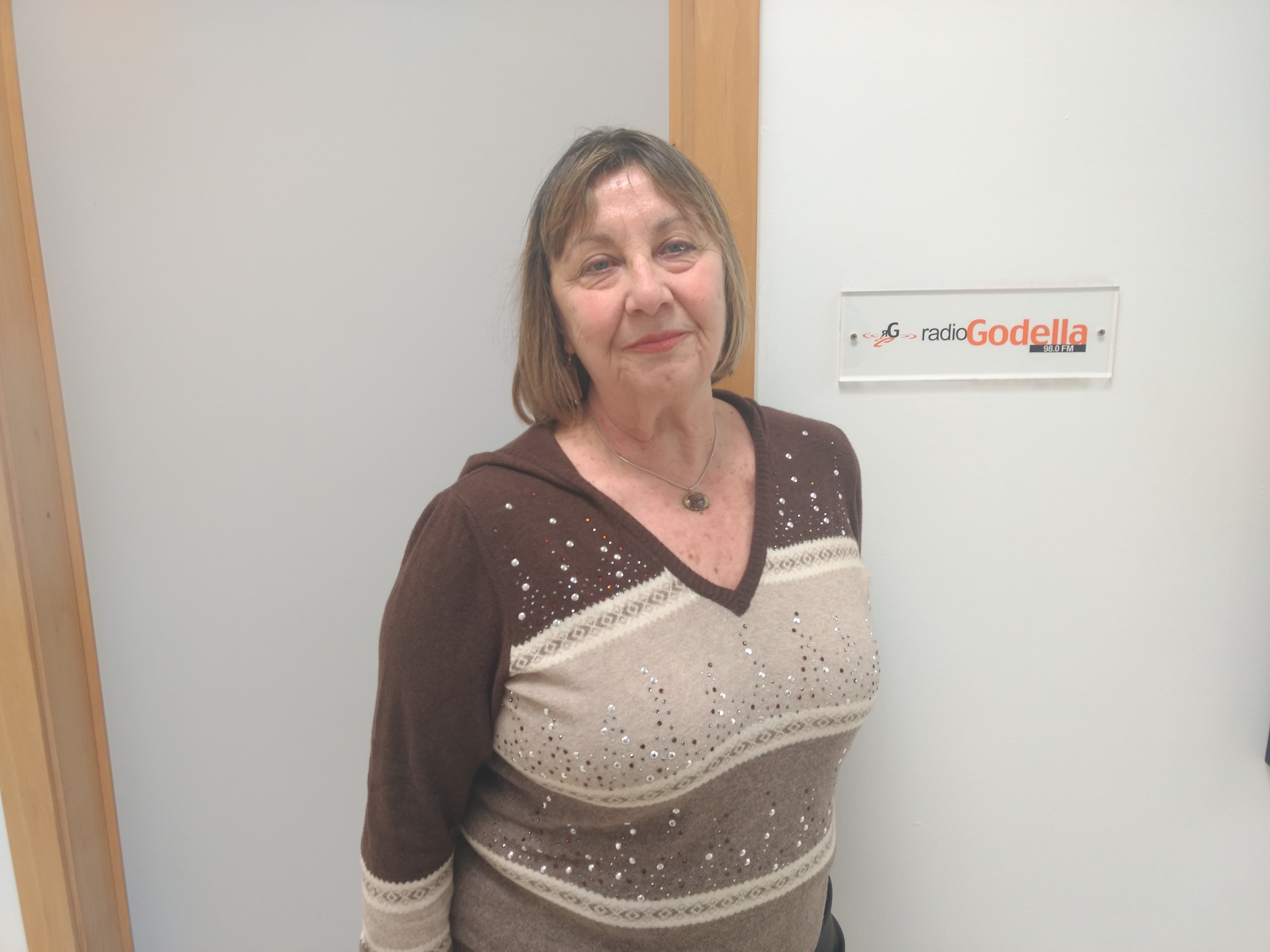 Rosa Solbes als estudis de Ràdio Godella.